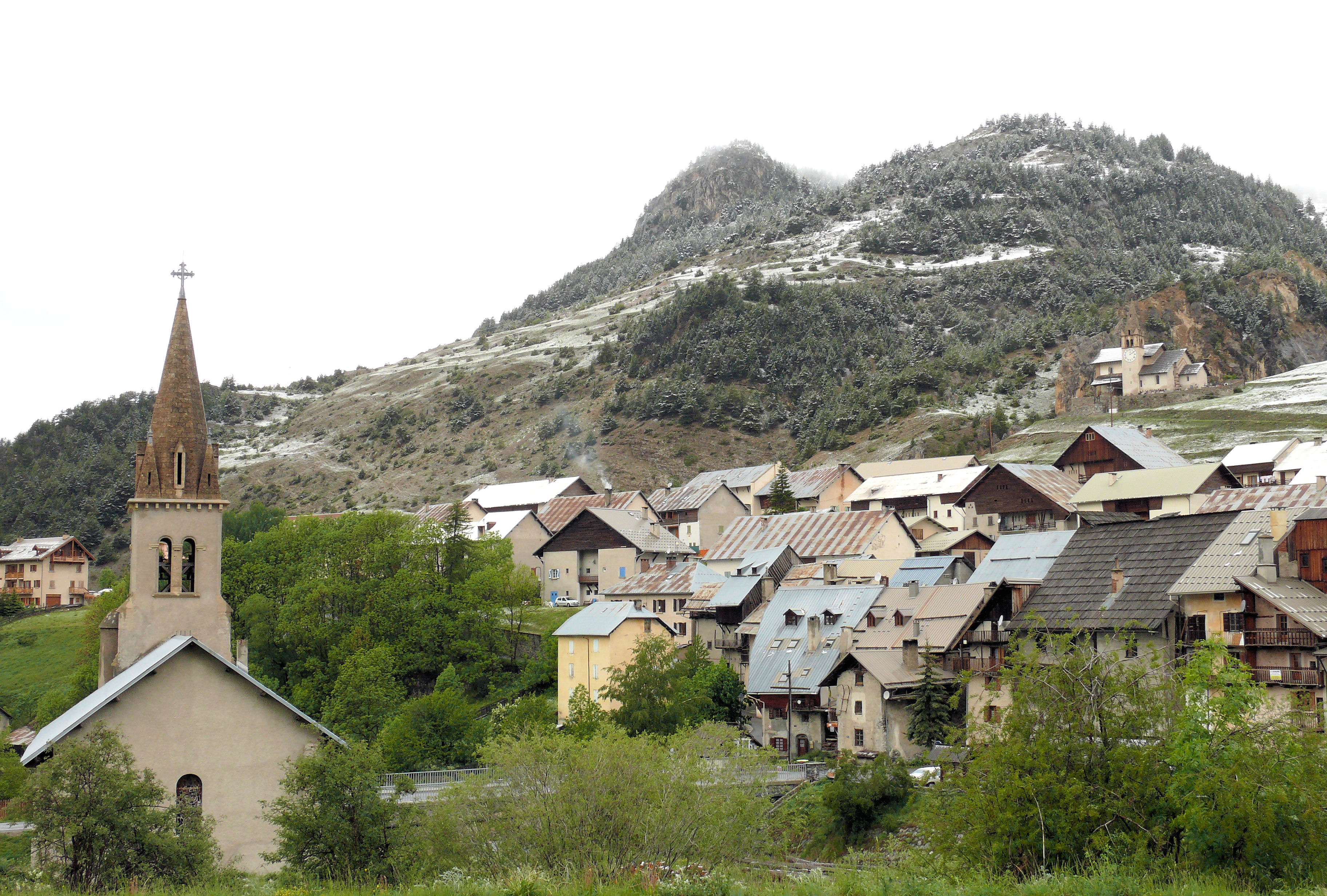 Cervières (Hautes-Alpes) - Vue d'ensemble